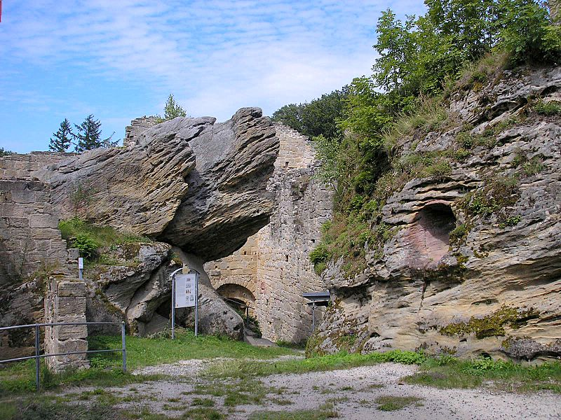 Burg Lichtenstein, Ruine der Nordburg (Gemeinde Pfarrweisach, Landkreis Haßberge, Unterfranken). Blick in den Burghof. Eigene Aufnahme, Aug. 2007 / Lichtenstein castle (Ruin of the northern castle) near Pfarrweisach (Lower Franconia, Germany). View into the courtyard. Own photo, Aug. 2007